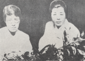 1920년대 YWCA에서 활동하던 이화여전 교수 김활란(우), 이화여전 교수이자 김규식의 처제 김필례(좌)